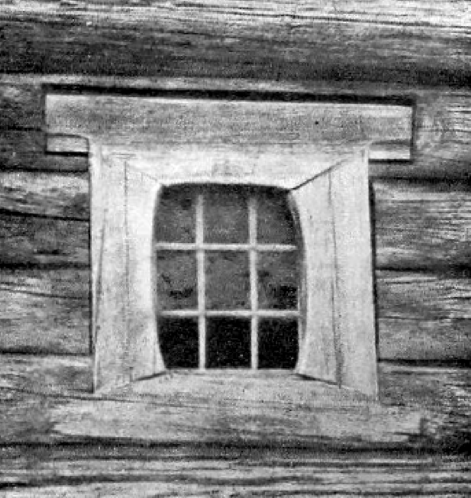 Окно алтарного прируба. Церковь Воскресения Христова в Совполье (Малая Немнюга), 1643 г.